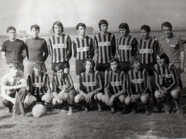 Fk Plantaža iz Donjeg Stopanja (1975)